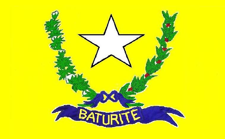 Bandeira da cidade de Baturité, estado do Ceará